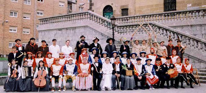 Gaztedidantza Taldea Santutxuko Karmelo plazan maskaradarekin 2014an